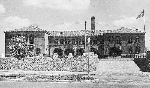 The concordia association of Manchukuo（満州国協和会）